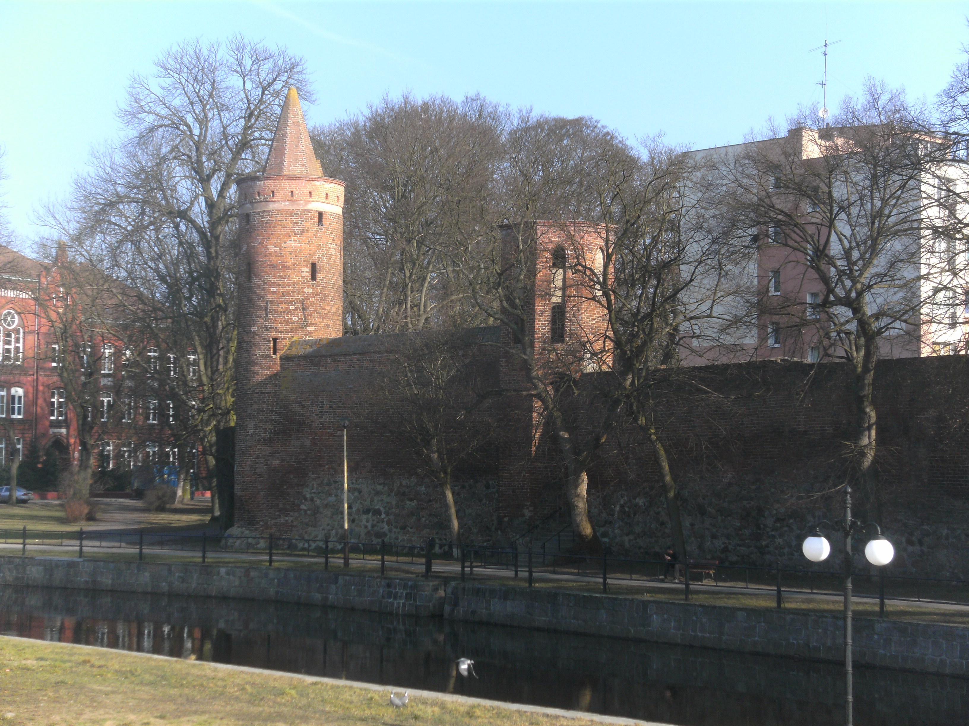 Mury miejskie w Goleniowie